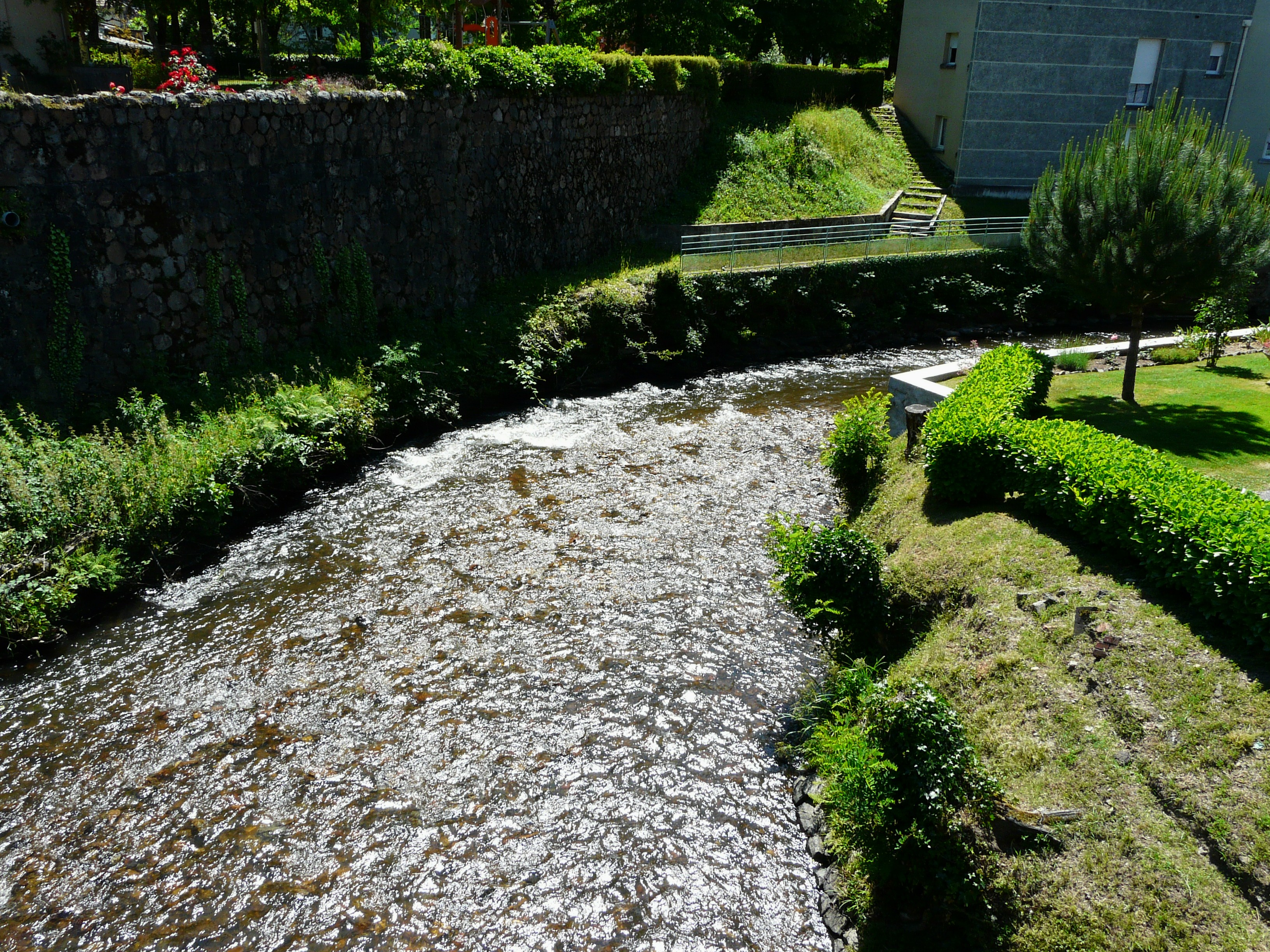 La Saint-Bonnette en aval du pont de la route nationale 120, à Laguenne, Corrèze, France